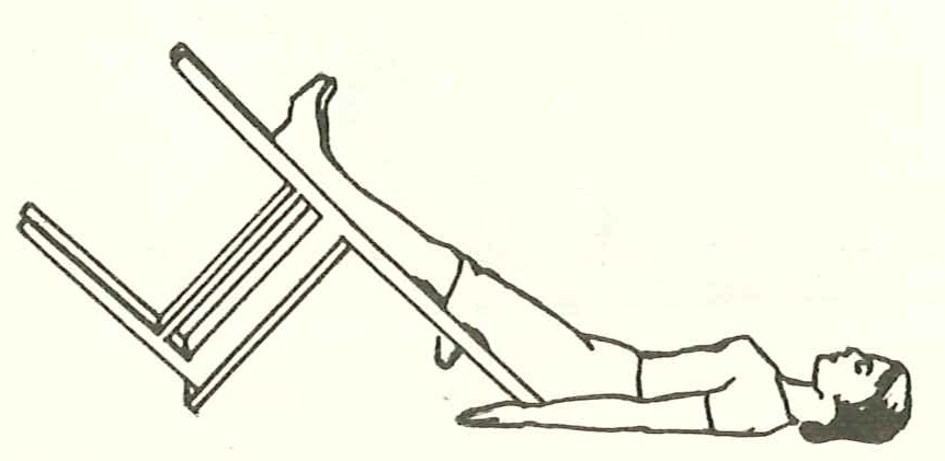 Lagerung bei Schock